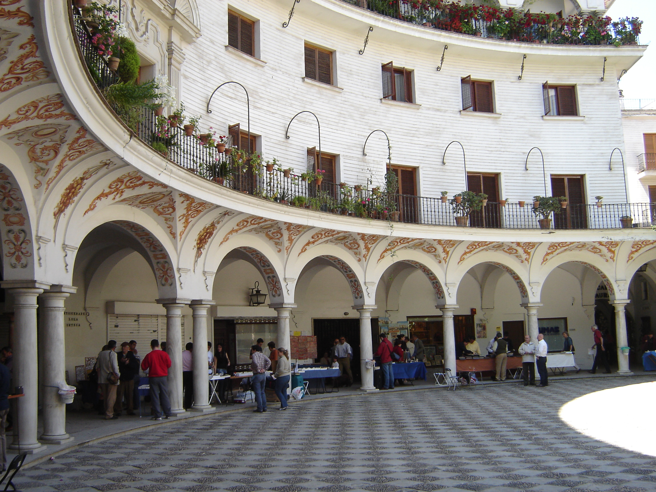 Mercadillo dominical dedicado en mayor parte a la venta de filatelia y numismática (Sevilla).